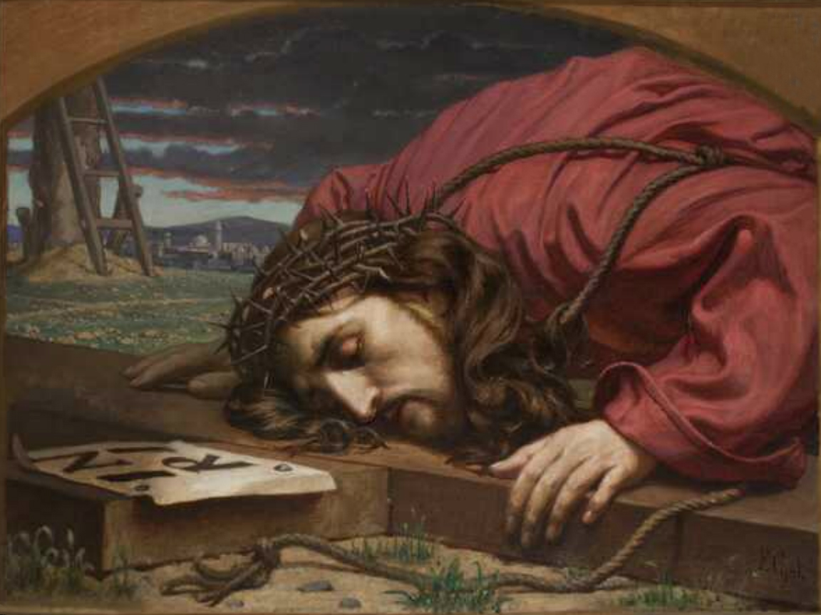 Chrystus upadający pod Krzyżem - ze zbiorów Muzeum Narodowego w Krakowie (Sukiennice)